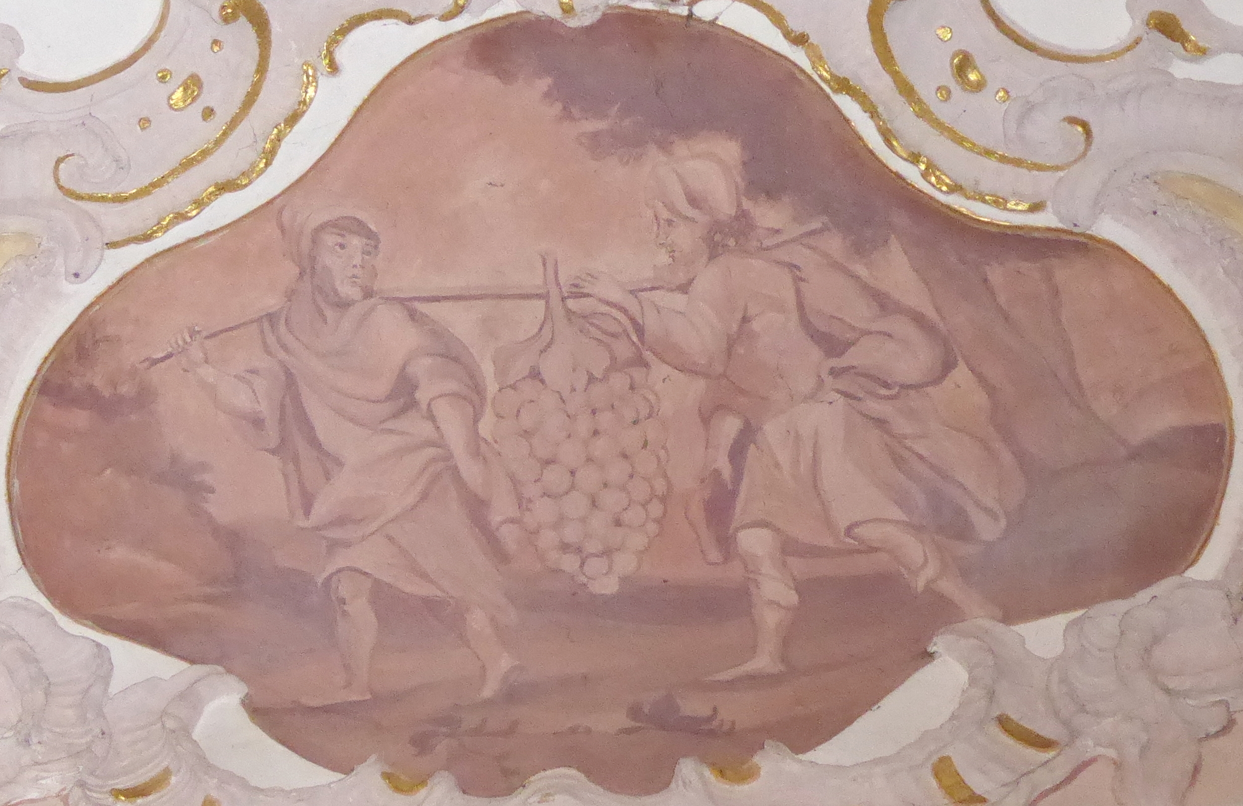 Deckengemälde in der Wallfahrtskirche Heilig Kreuz in Mindelaltheim